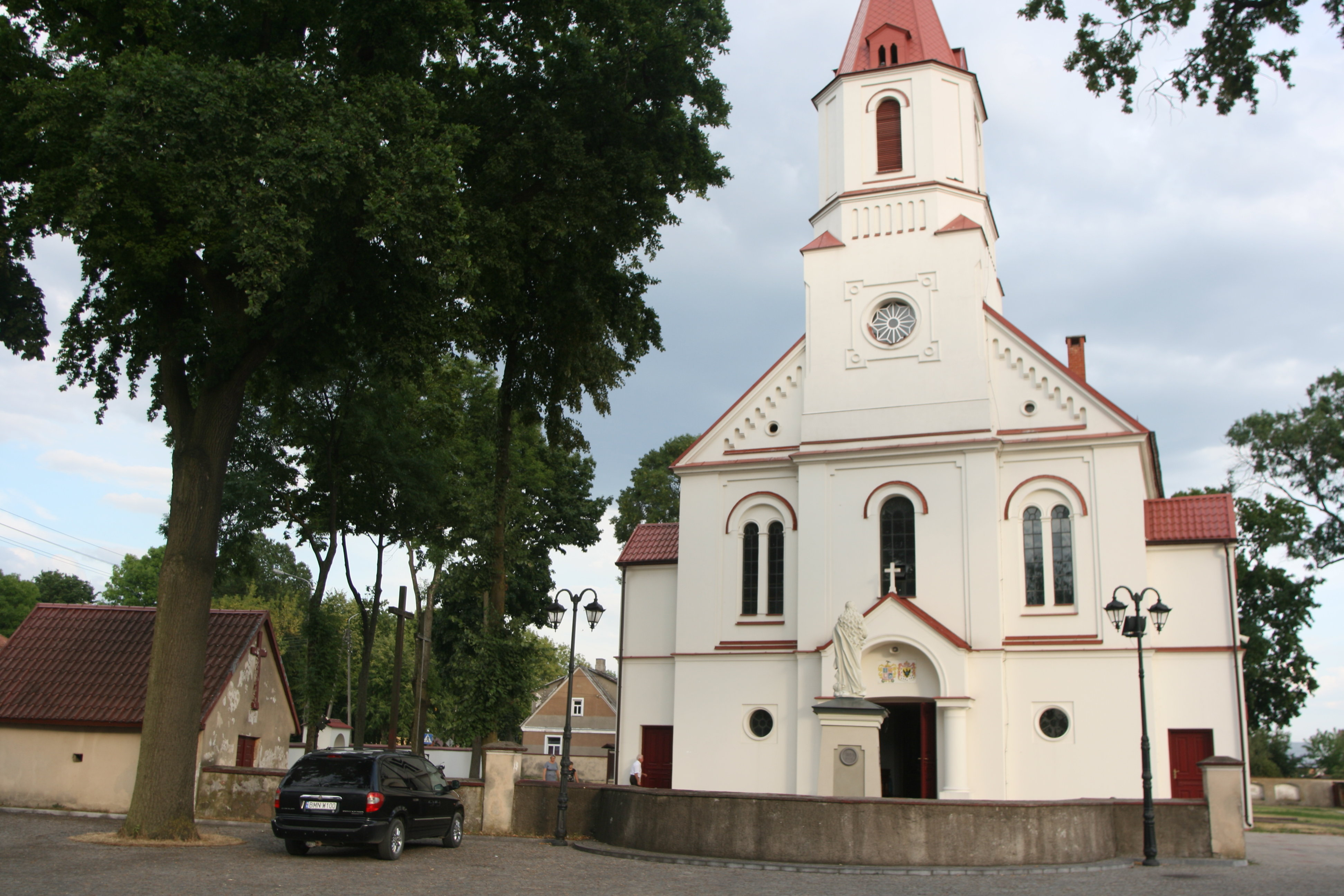 Knyszyn, Poland